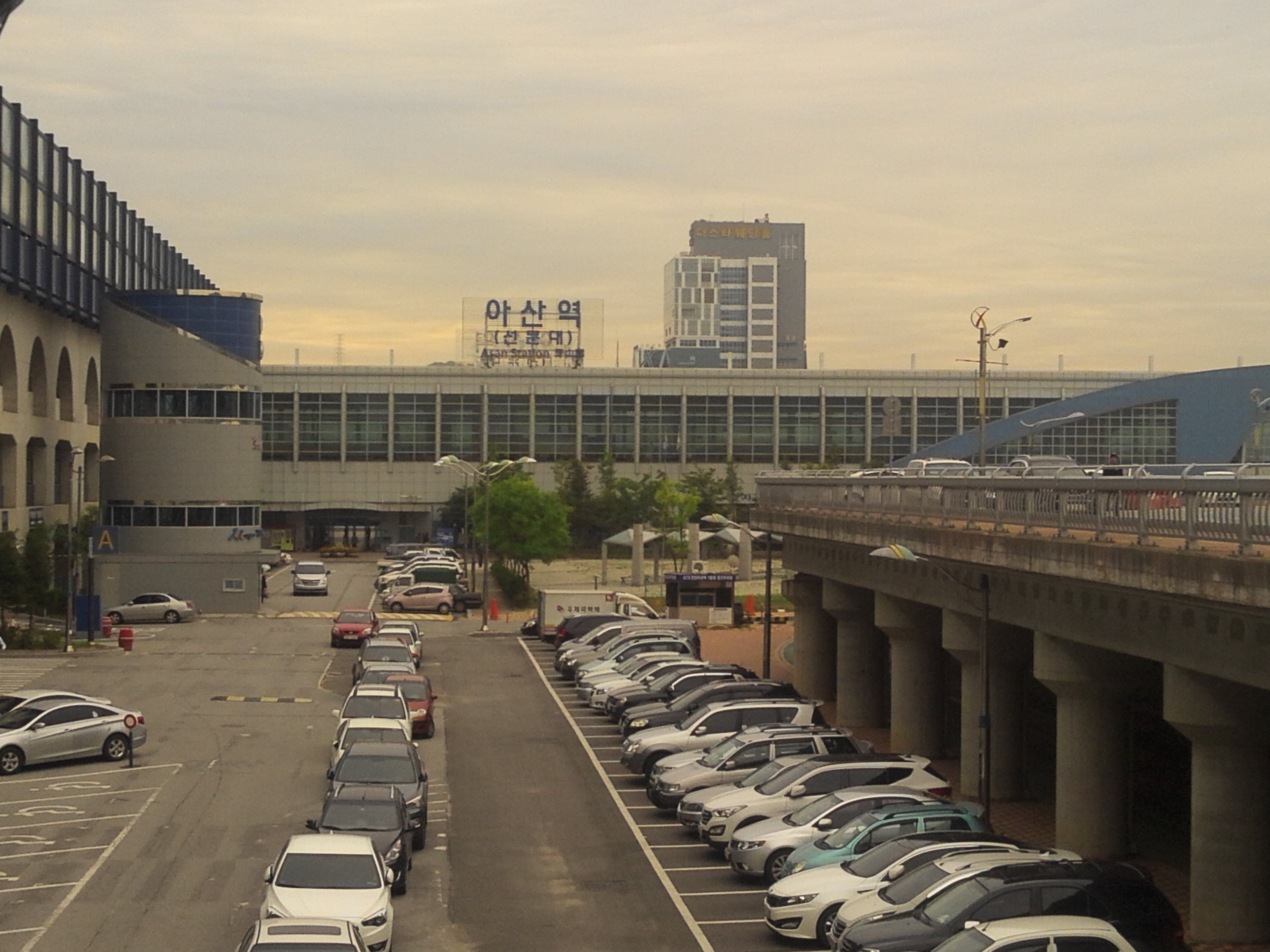 천안아산역에서 본 아산역